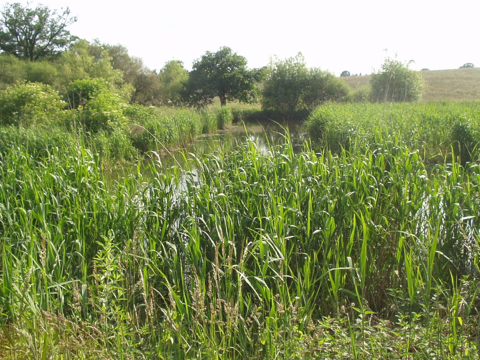 La Verzée à Pouancé